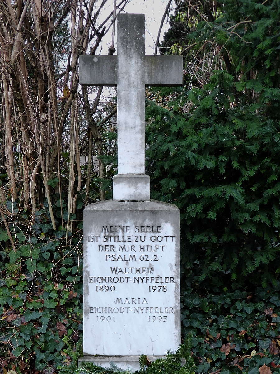 Walther Eichrodt-Nyffeler (1890–1978), Theologe, Prof. für Altes Testament und Religionsgeschichte Mehrfach Dekan der Theol. Fakultät, 1953 Rektor., Ehrendoktor der Theologie, Grab auf dem Friedhof Wolfgottesacker, Basel